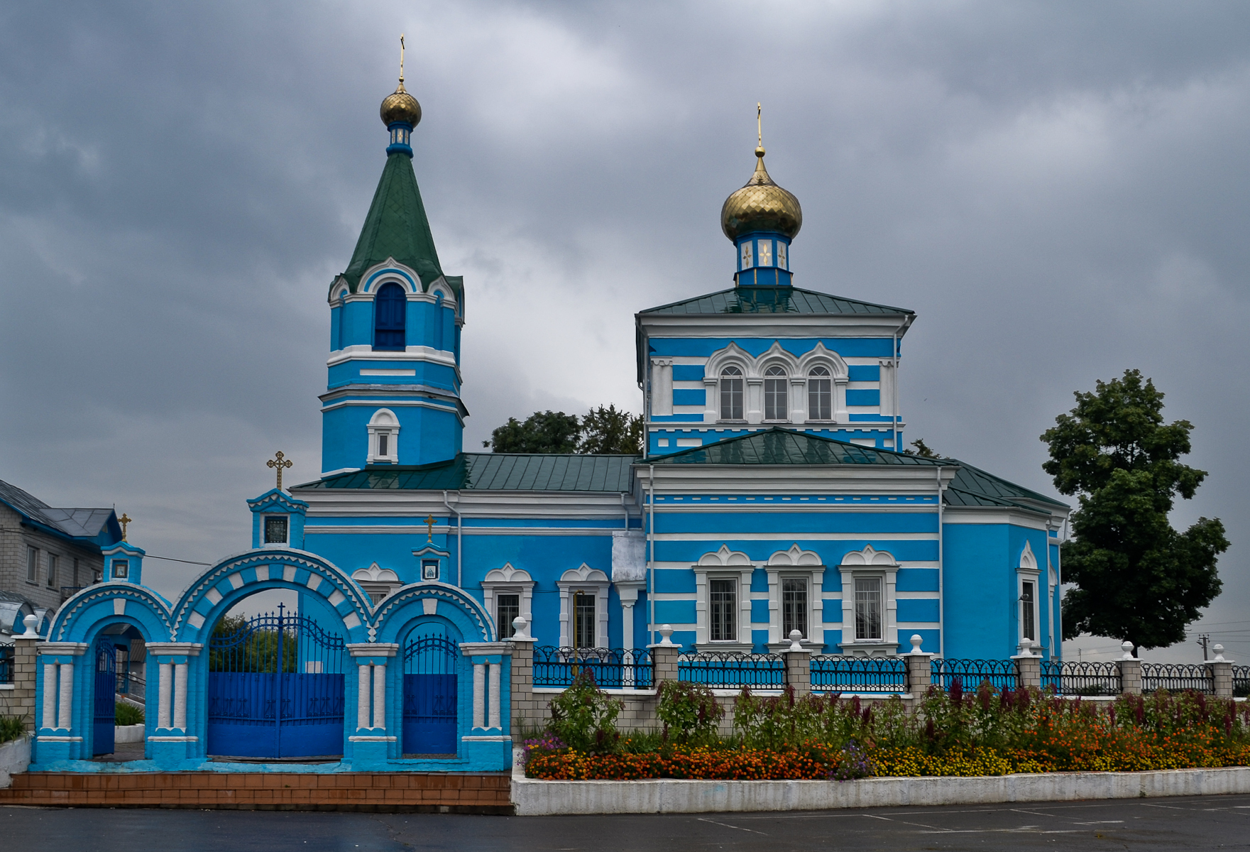 Беларуская (тарашкевіца): Пакроўская царква і тэрыторыя ў межах агароджы. в. Карма